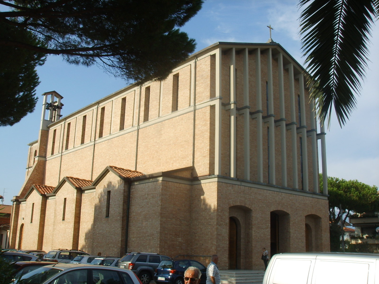 Viareggio, chiesa di don bosco